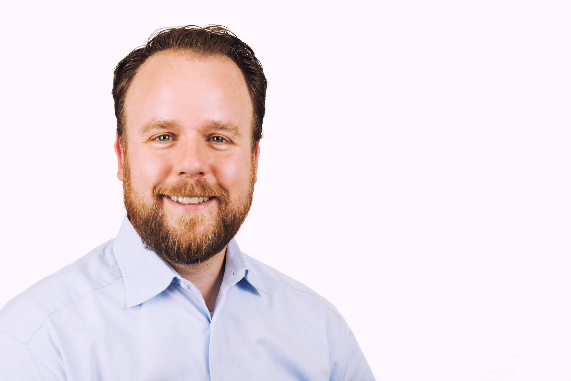 Professor von Blanckenburg, Seiten der Hochschule OWL